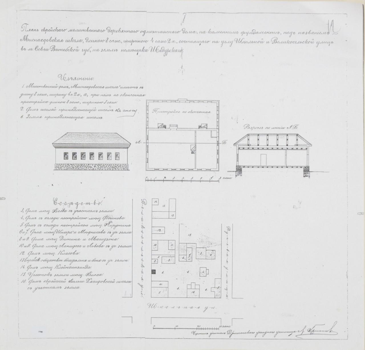 Беларуская (тарашкевіца): Асьвея (Aśvieja), рог вуліц Школьнай (vulica Školnaja) і Вялікасельскай (vulica Vialikasielskaja). Сынагога